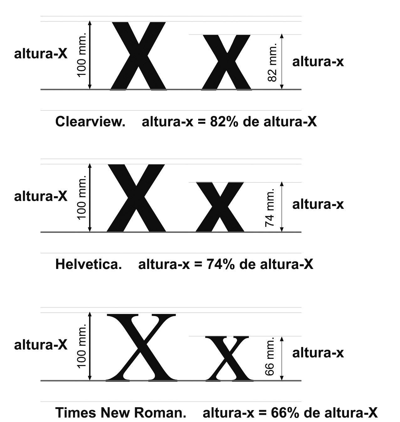 Ilustra la relación altura-x a altura-X en varios tipos de letra.